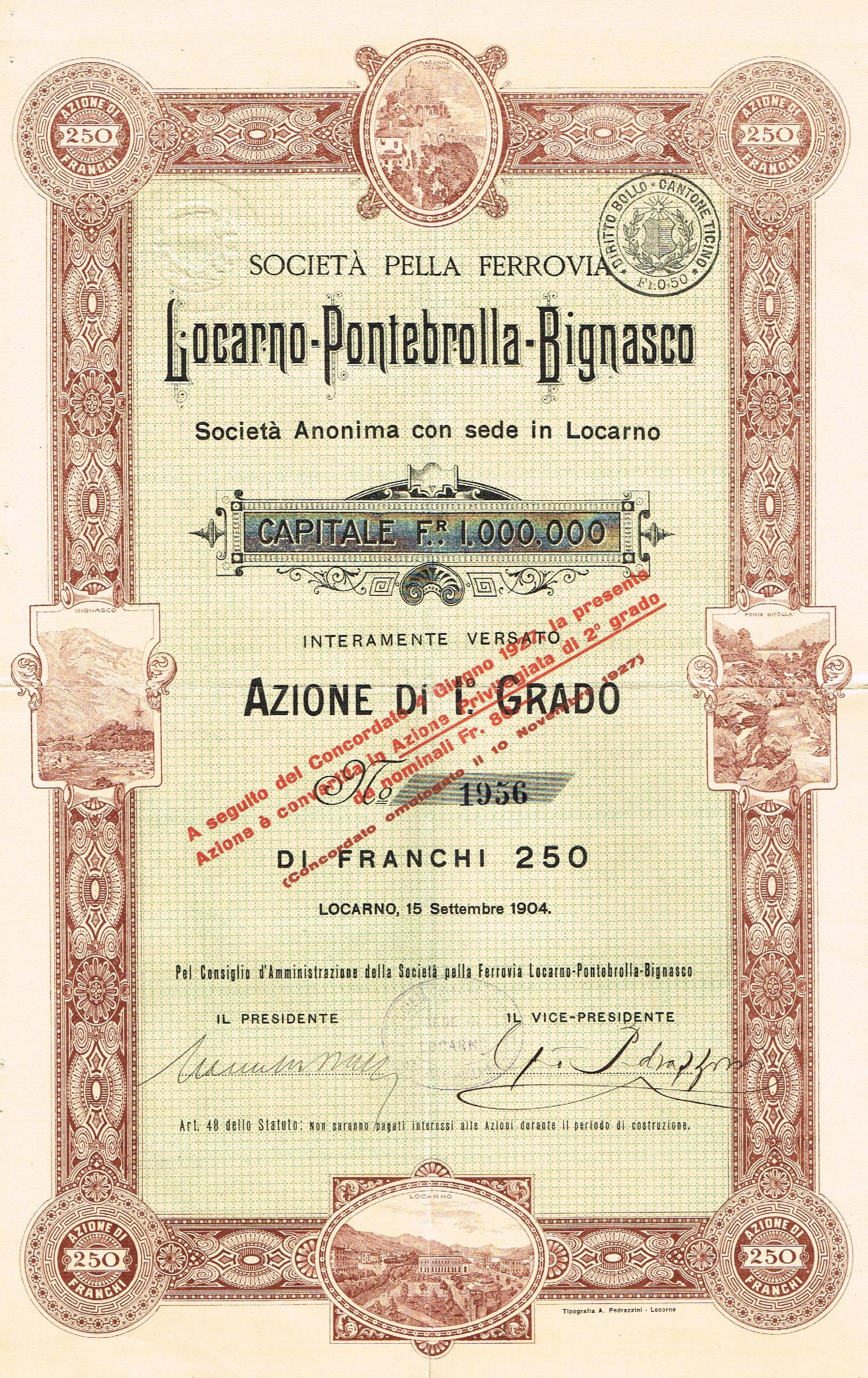 Aktie di 1. Grado über 250 Franken, Locarno, 15. September 1904, Auflage 4'000 Stück, Abbildungen von Bignasco, Locarno, Ponte Brolla und Madonna del Sasso; Seit 1.1.1949 in die Gesellschaft Ferrovie regionali Ticinesi integriert, die wiederum am 1.7.1961 mit anderen Gesellschaften zur 'Ferrovie autolinee regionali Ticinese' (FART) fusionierte.